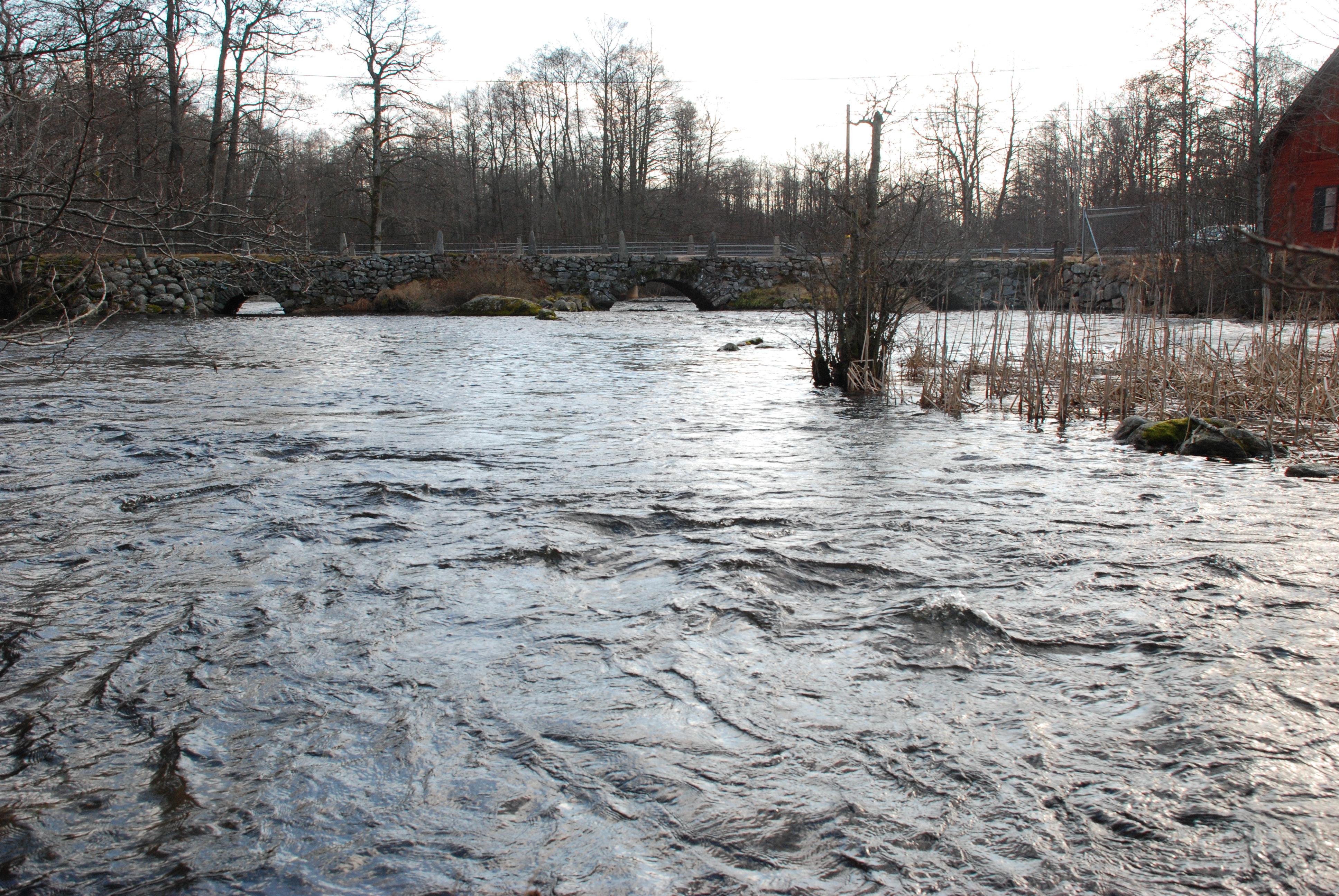 Gamla stenbron över Helige å